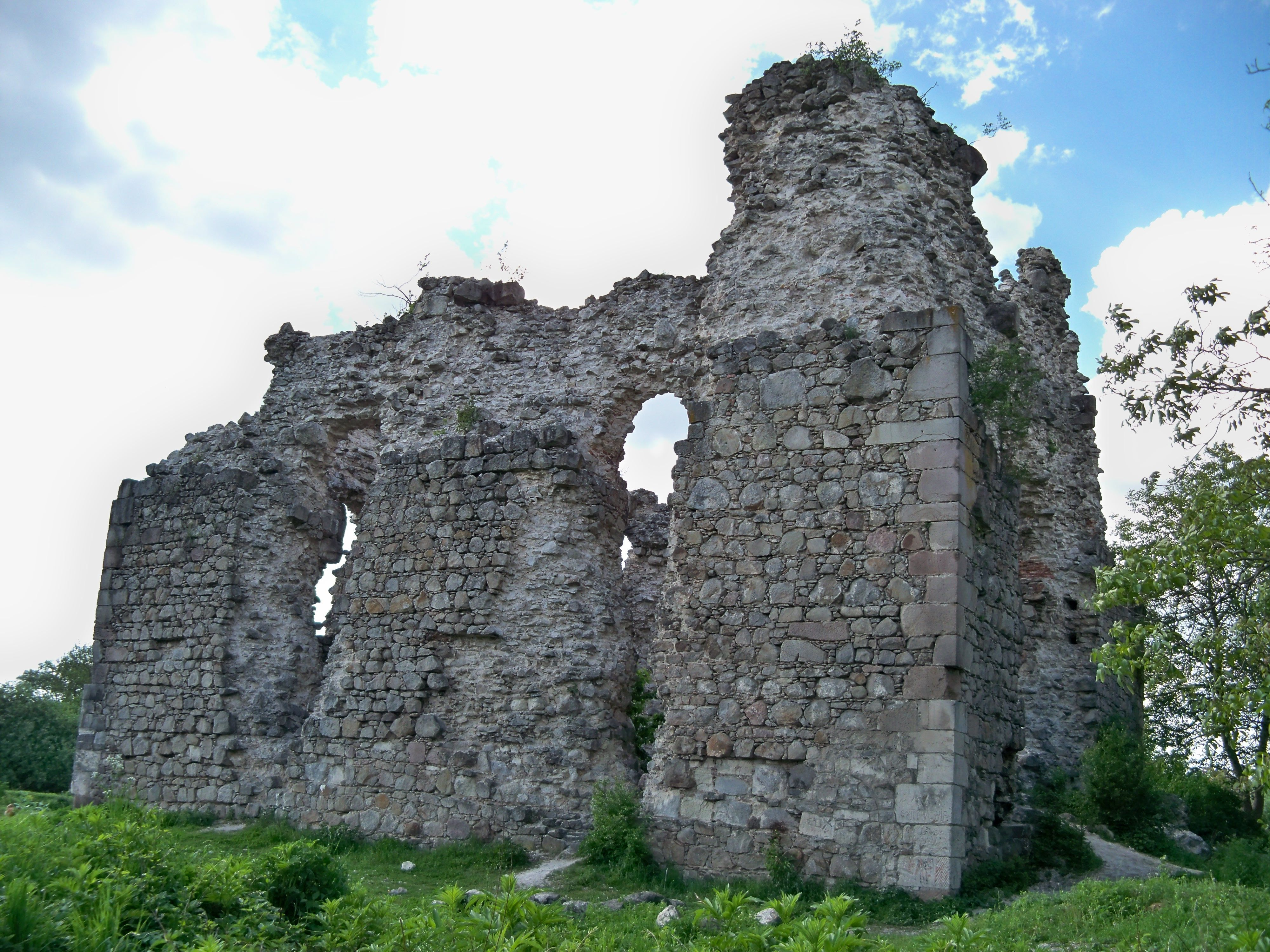 Замок (мур.), смт.Середнє